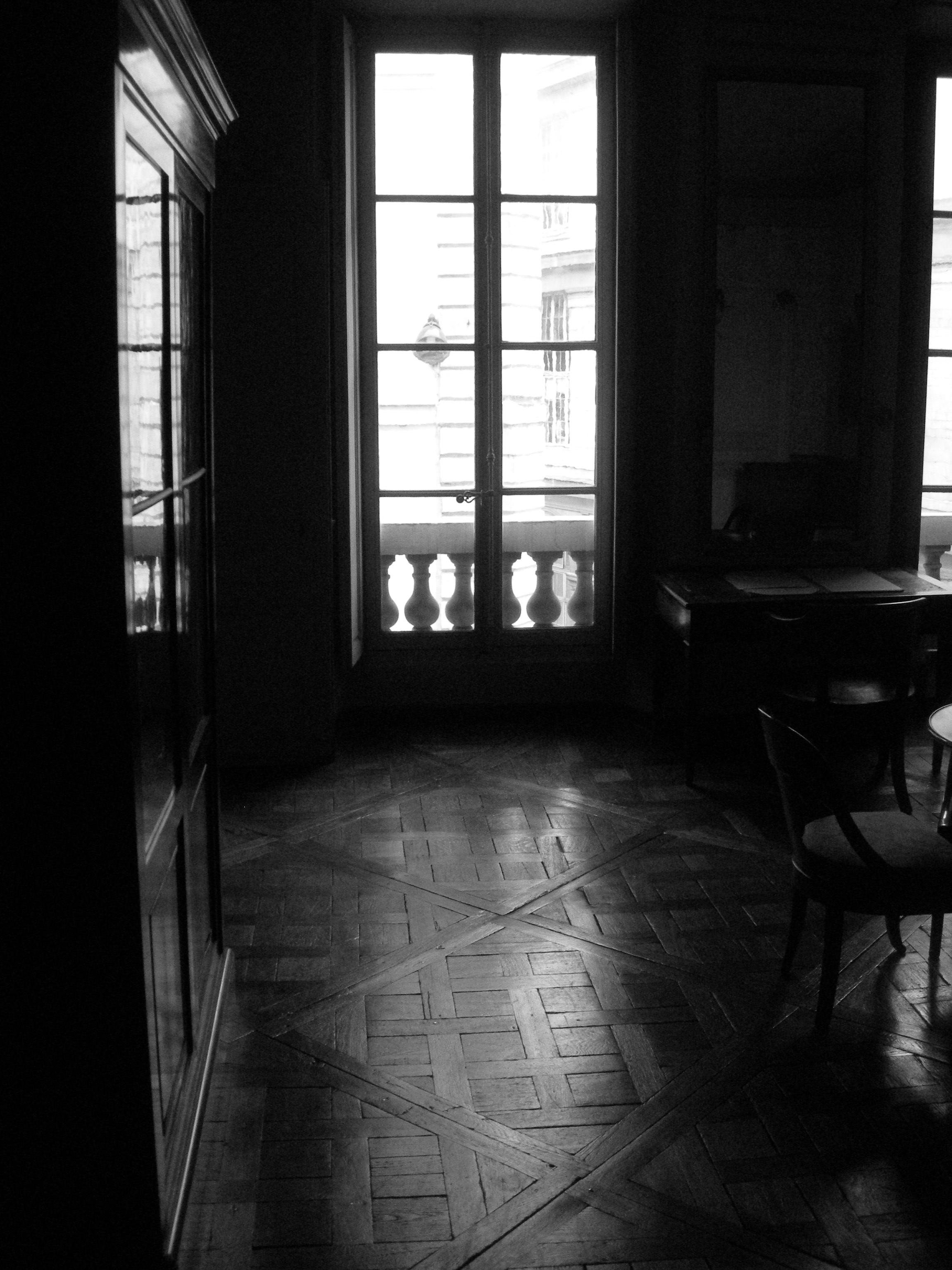 noir et blanc Maison Auguste Comte